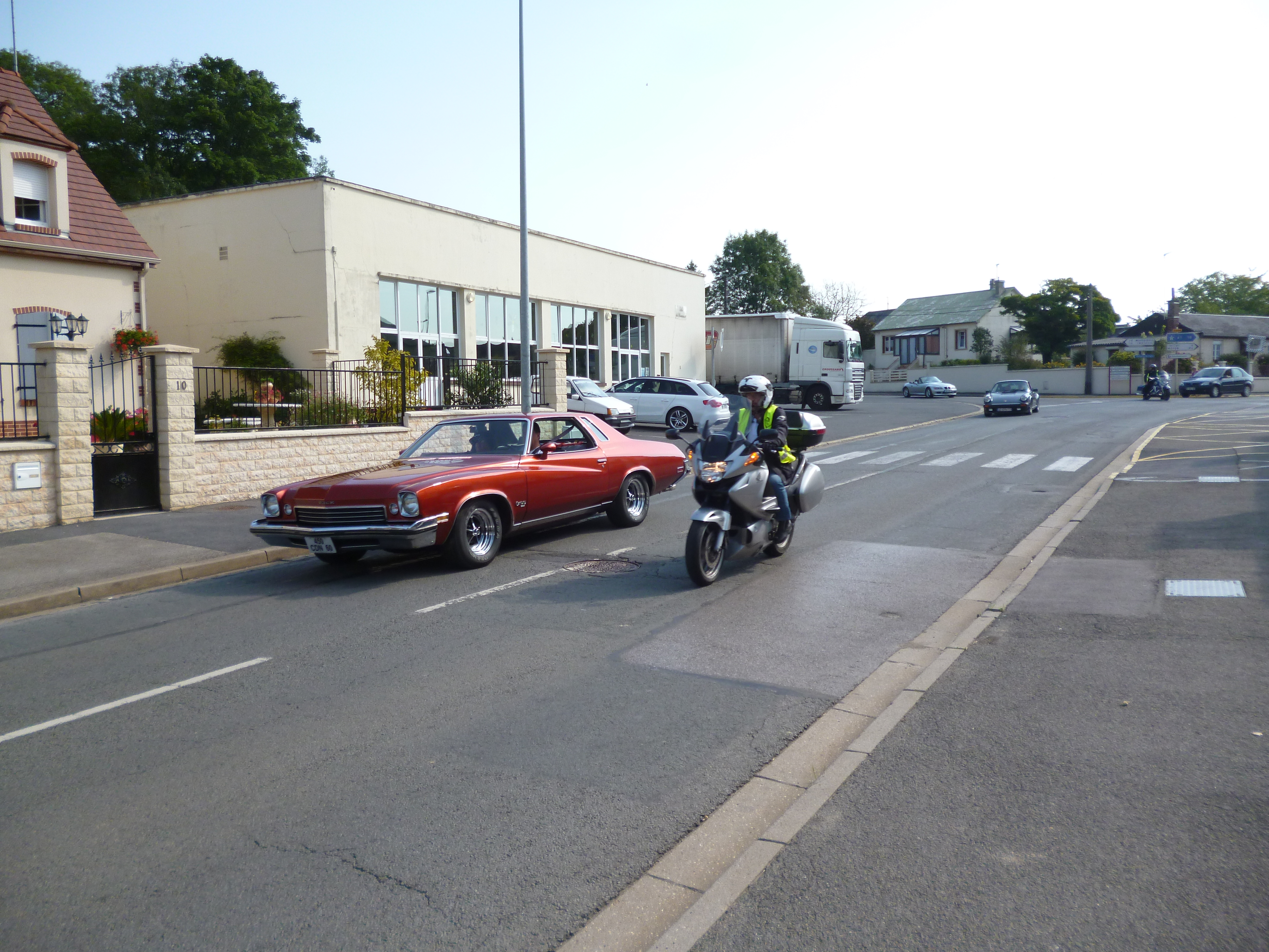 Une Buick Century coupée, lors d'un défilé à Maignelay-Montigny, dans l'Oise.